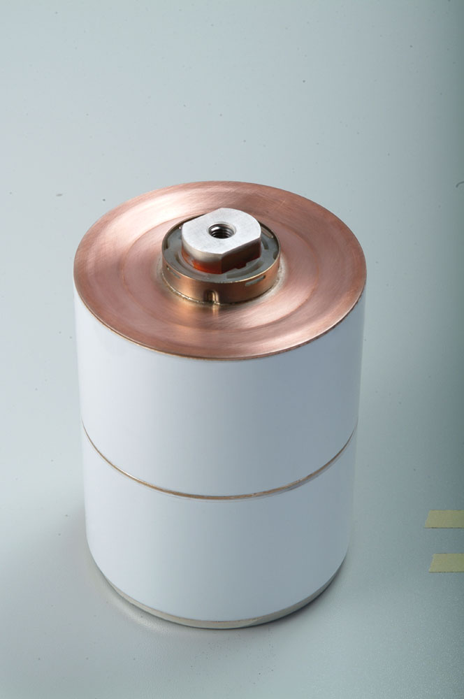 Medium voltage vacuum interrupter